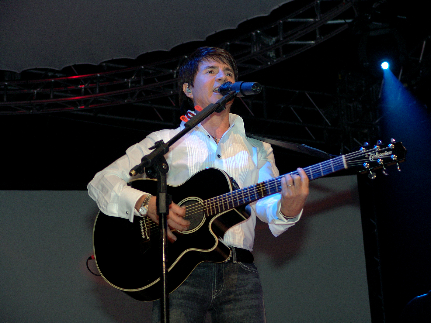 Brazilian singer Xororó, from Chitãozinho & Xororó.Xororó - Guitar